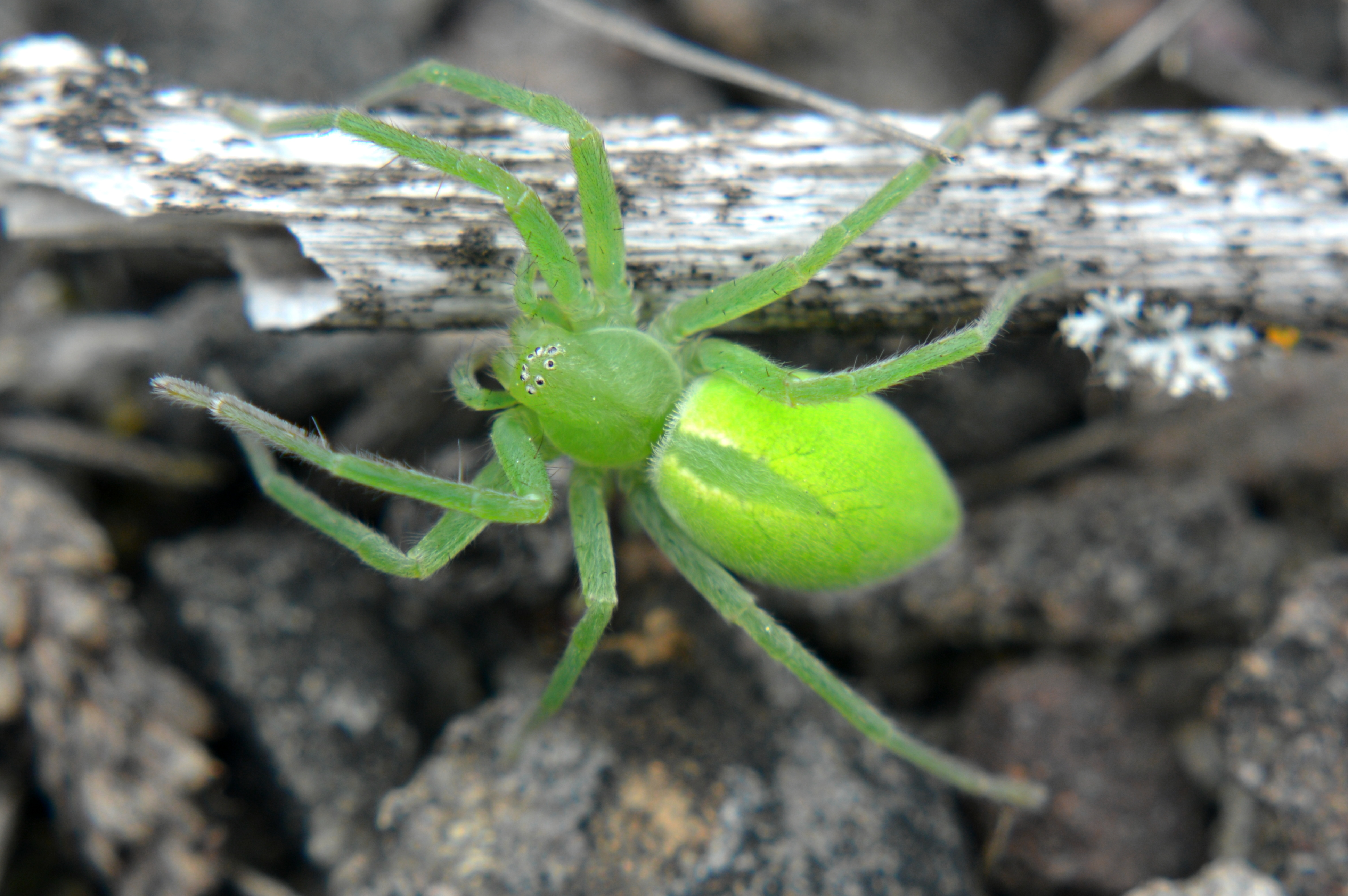 Eine Grüne Huschspinne (Micrommata virescens) im FFH-Gebiet DE-3827-332 „Kammmolch-Biotop Tagebau Haverlahwiese“ in Salzgitter, Niedersachsen